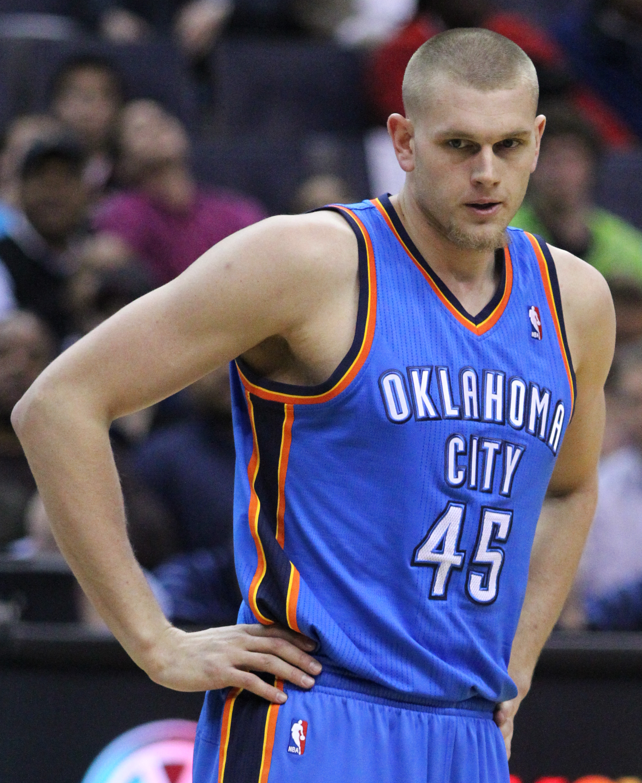 Wizards v/s Thunder 03/14/11